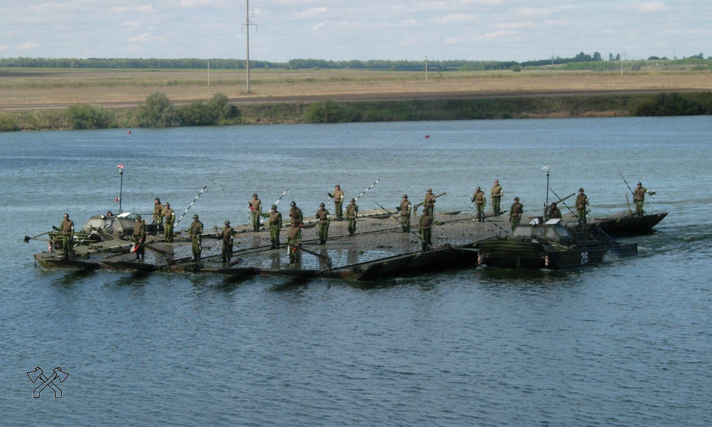 ППС-84